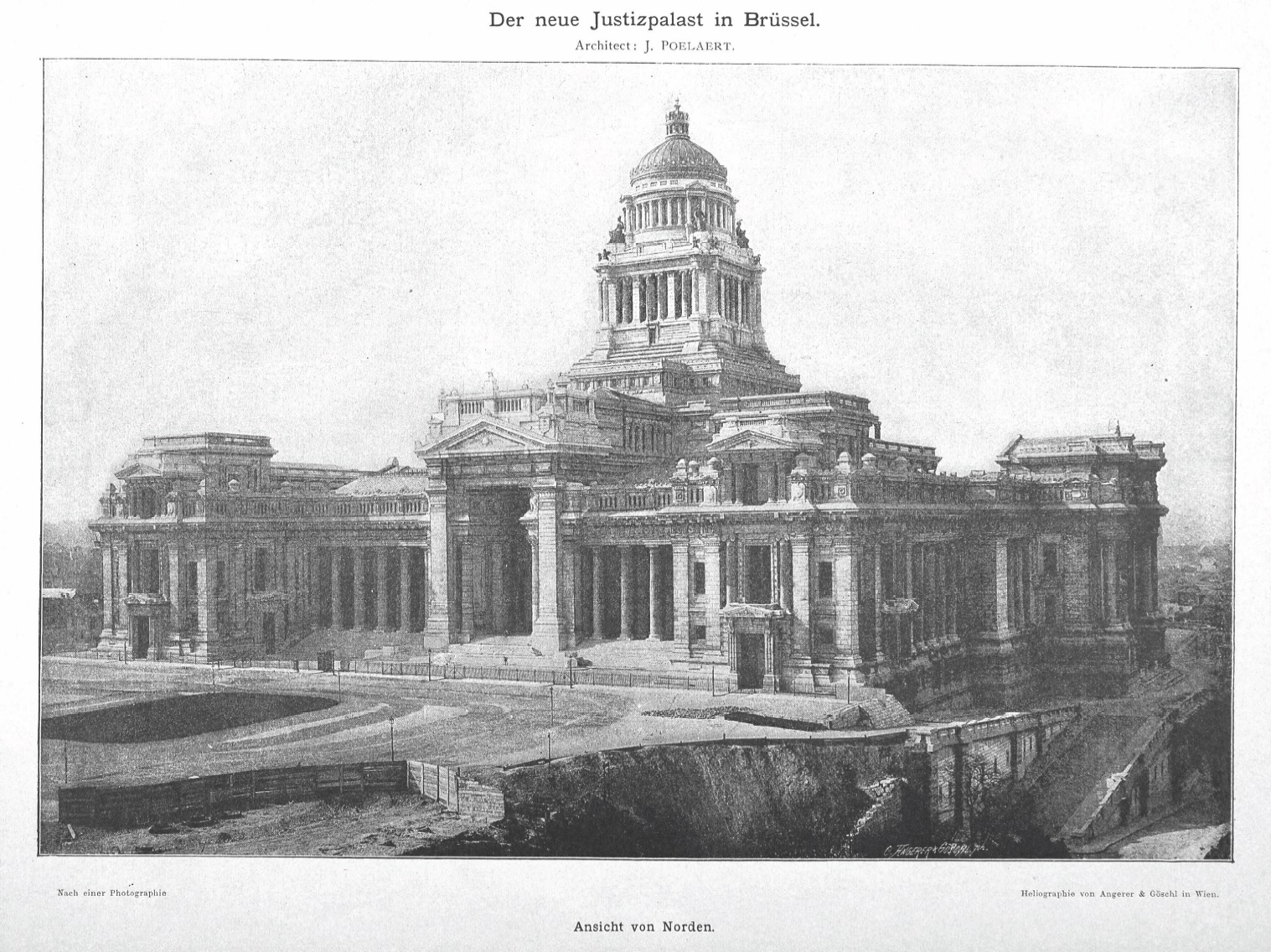 Der neue Justizpalast in Brüssel, Ansicht von Norden